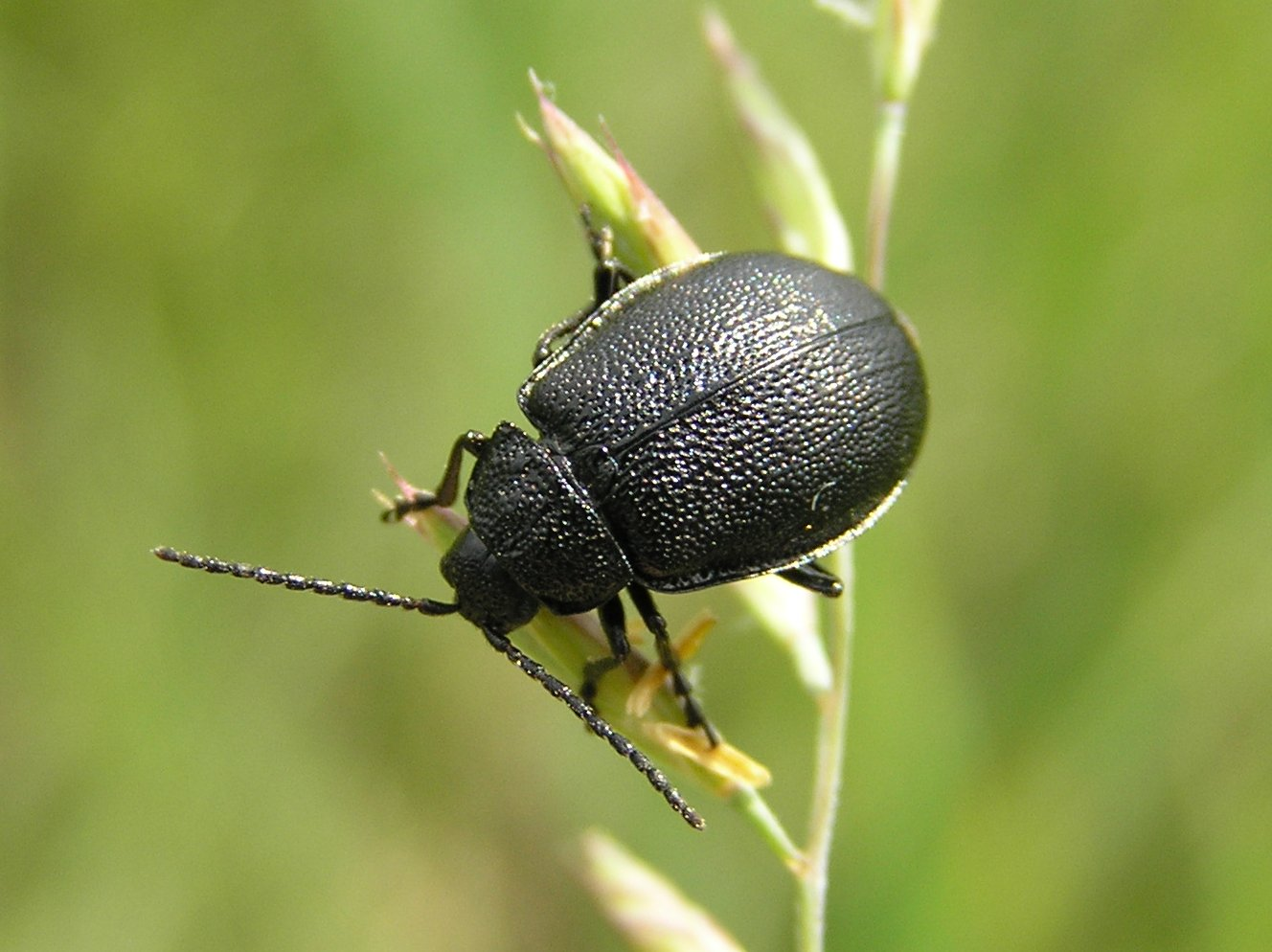 Galeruca tanaceti - Rozdestnica wrotyczówka; Białowieża, Polska